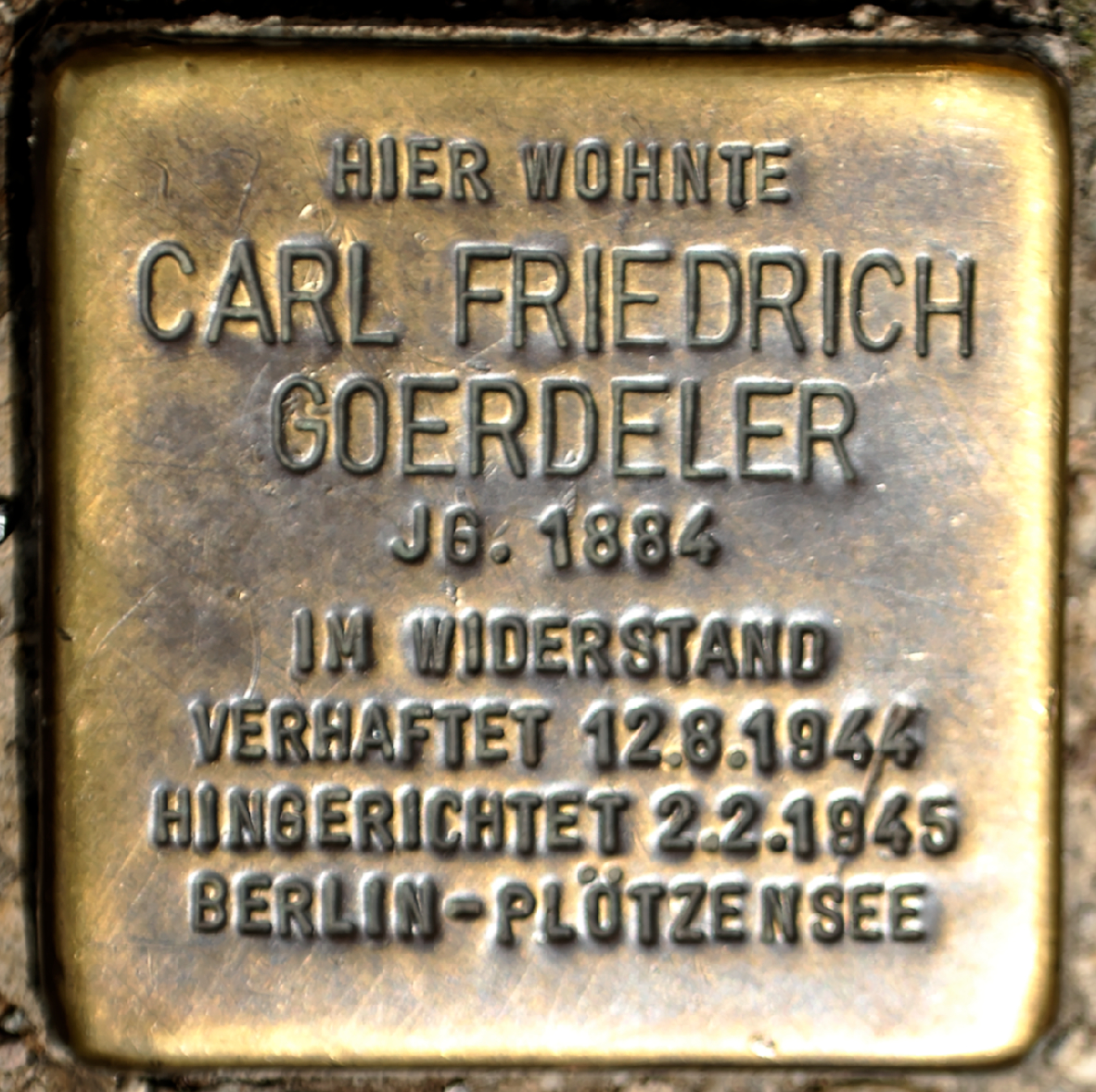 Stolpersteine in Solingen